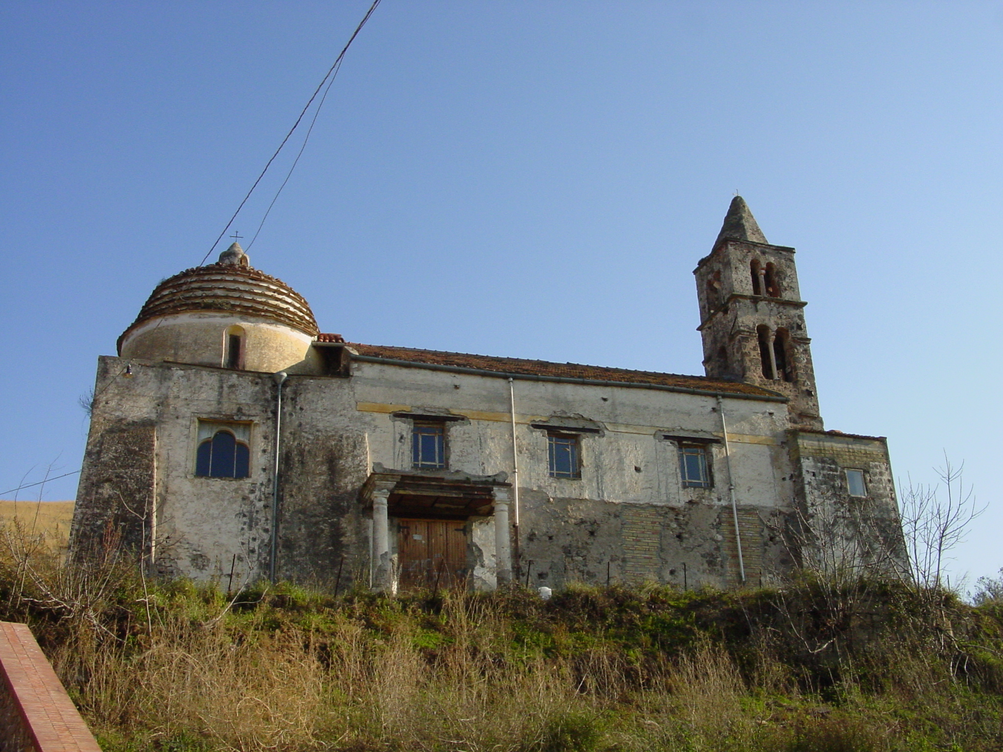 Chiesa di San Giorgio Martire, a Pignataro Maggiore.